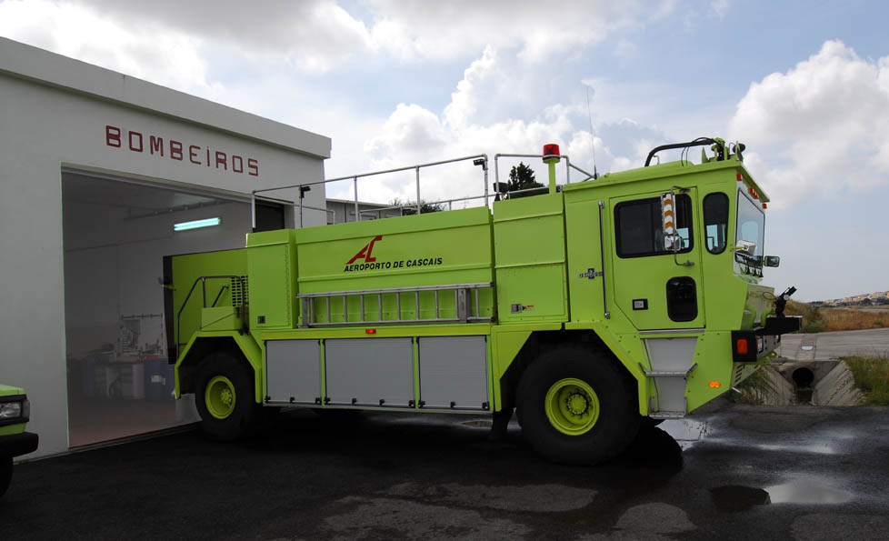 Bombeiros Aerodromo Aeroporto de Cascais